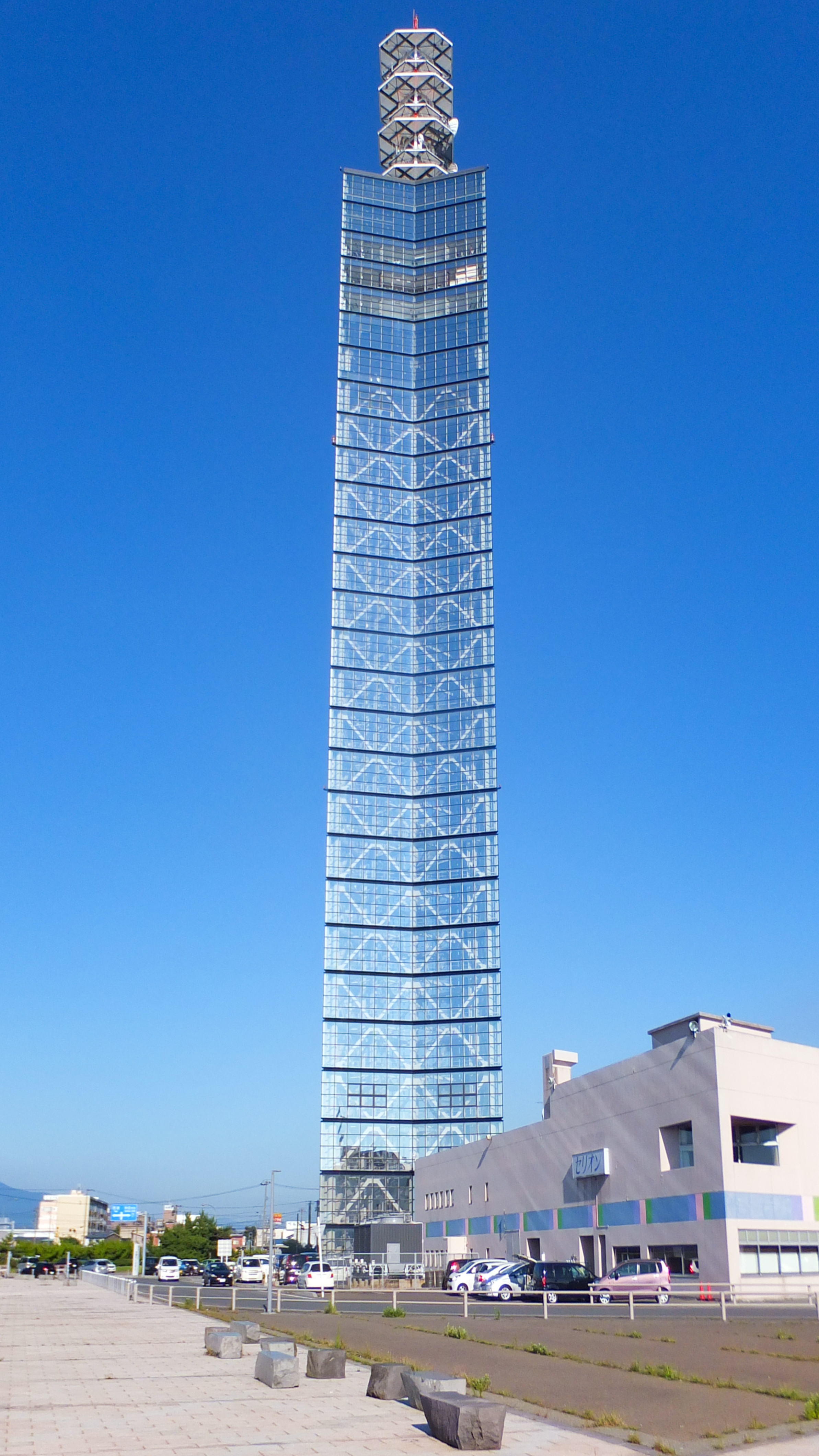 秋田ポートタワー・セリオン